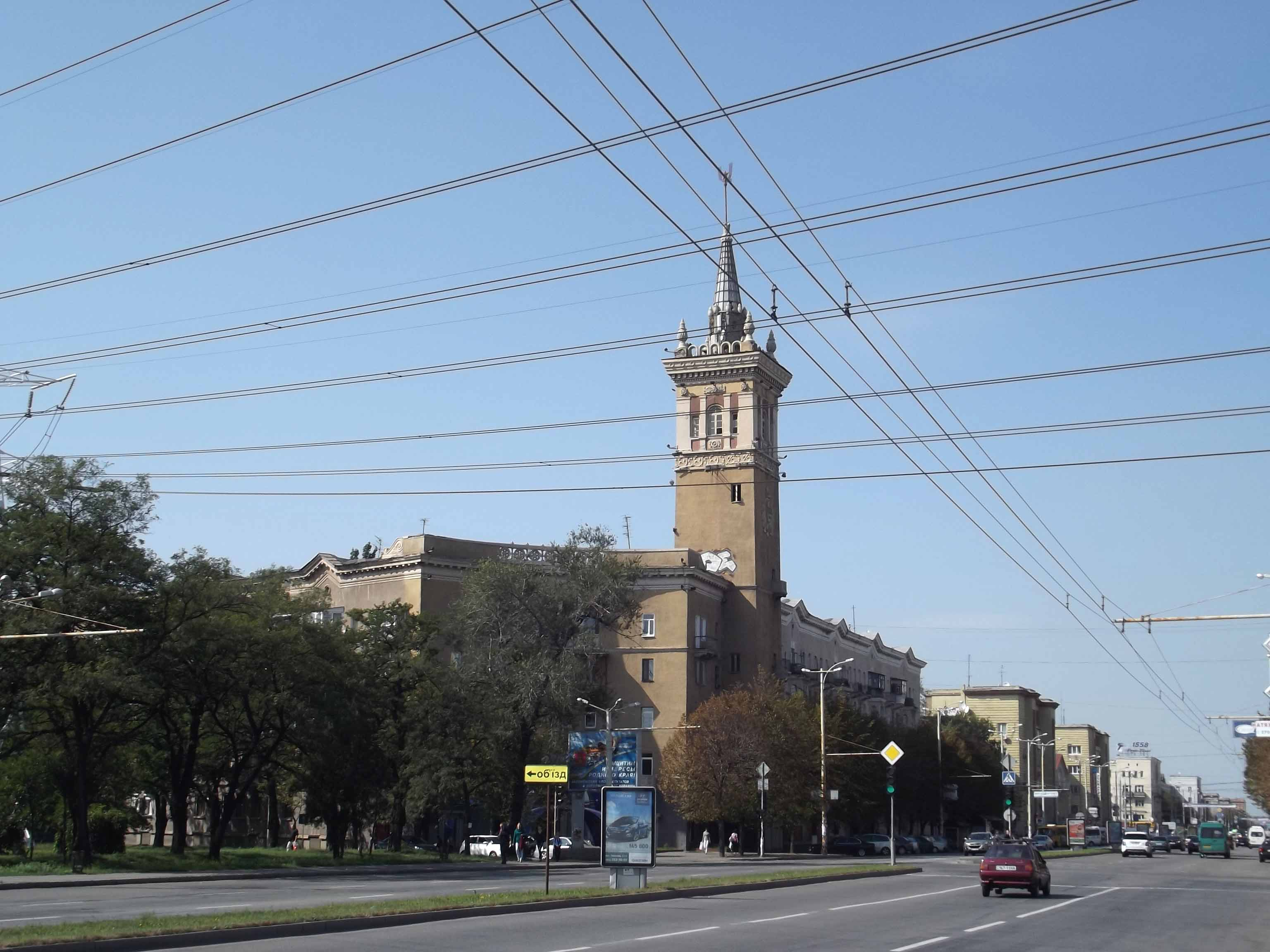 Башня на проспекте Ленина